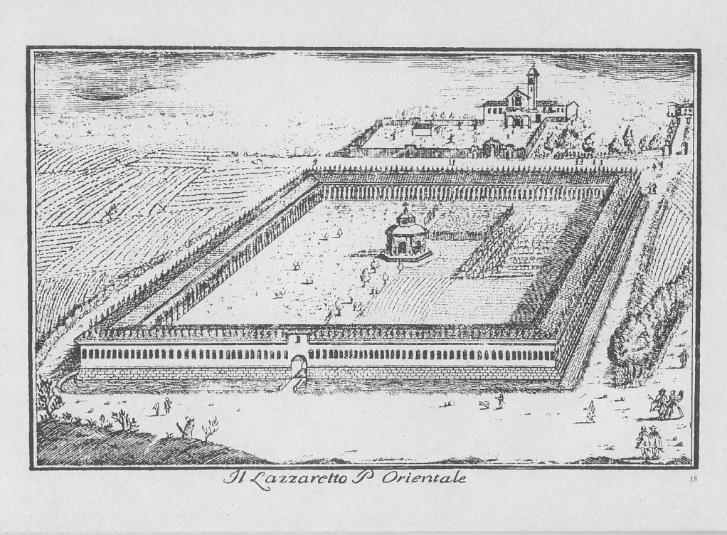 Marc'Antonio Dal Re (1697-1766),Il Lazzaretto di Milano. Dalla serie di 88 Vedute di Milano pubblicata da Del Re attorno al 1745.